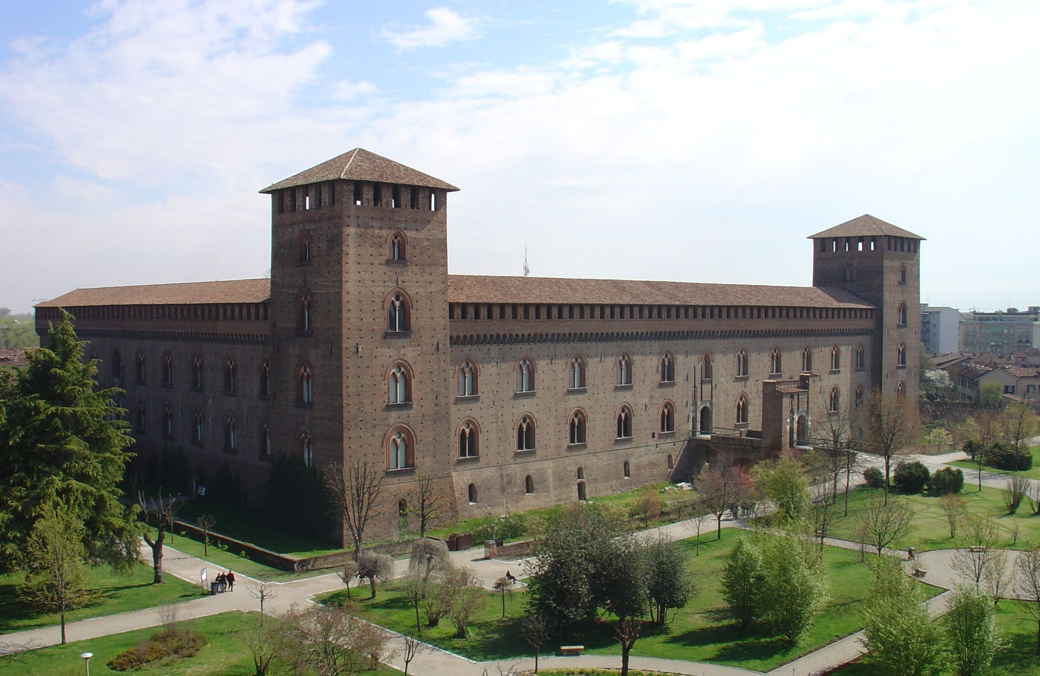 Castello Sforzesco (2)